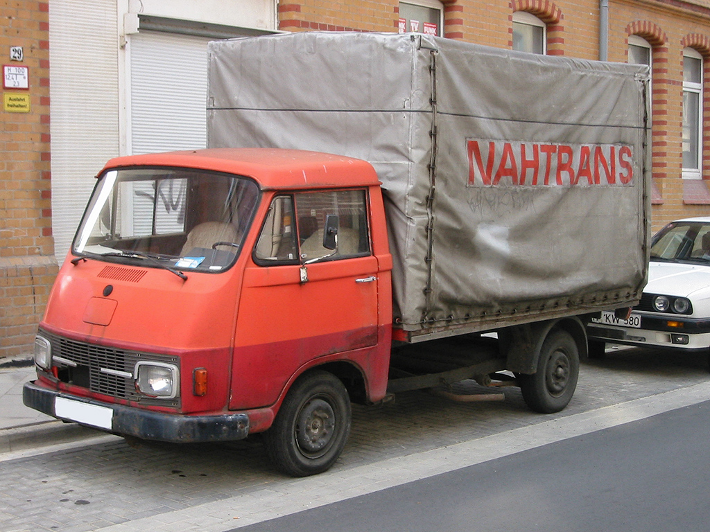 Harburger Transporter Pritsche